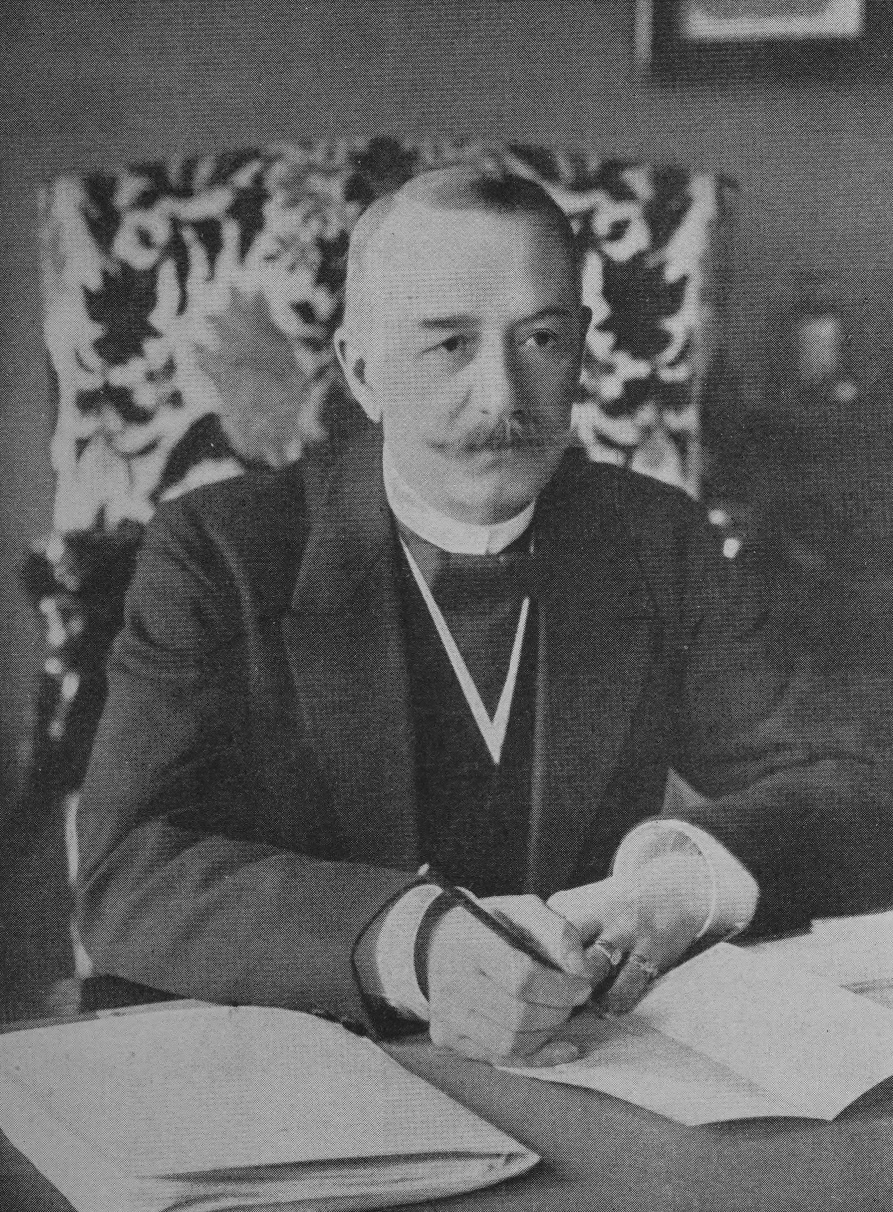 El político conservador y presidente de la última Duma zarista, Alexander Protopopov.